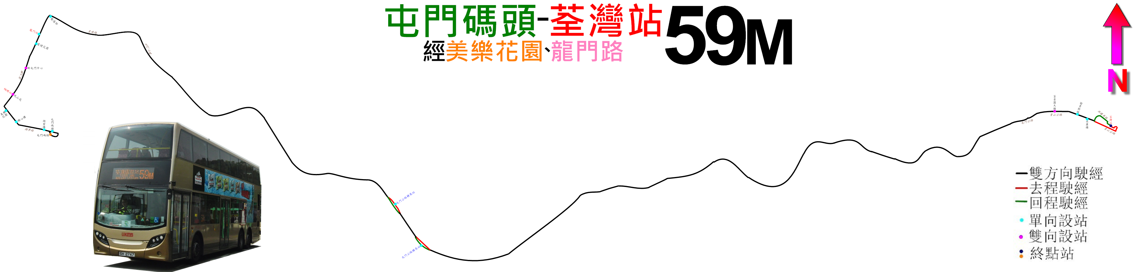 中文（香港）: 九巴59M線的走線圖